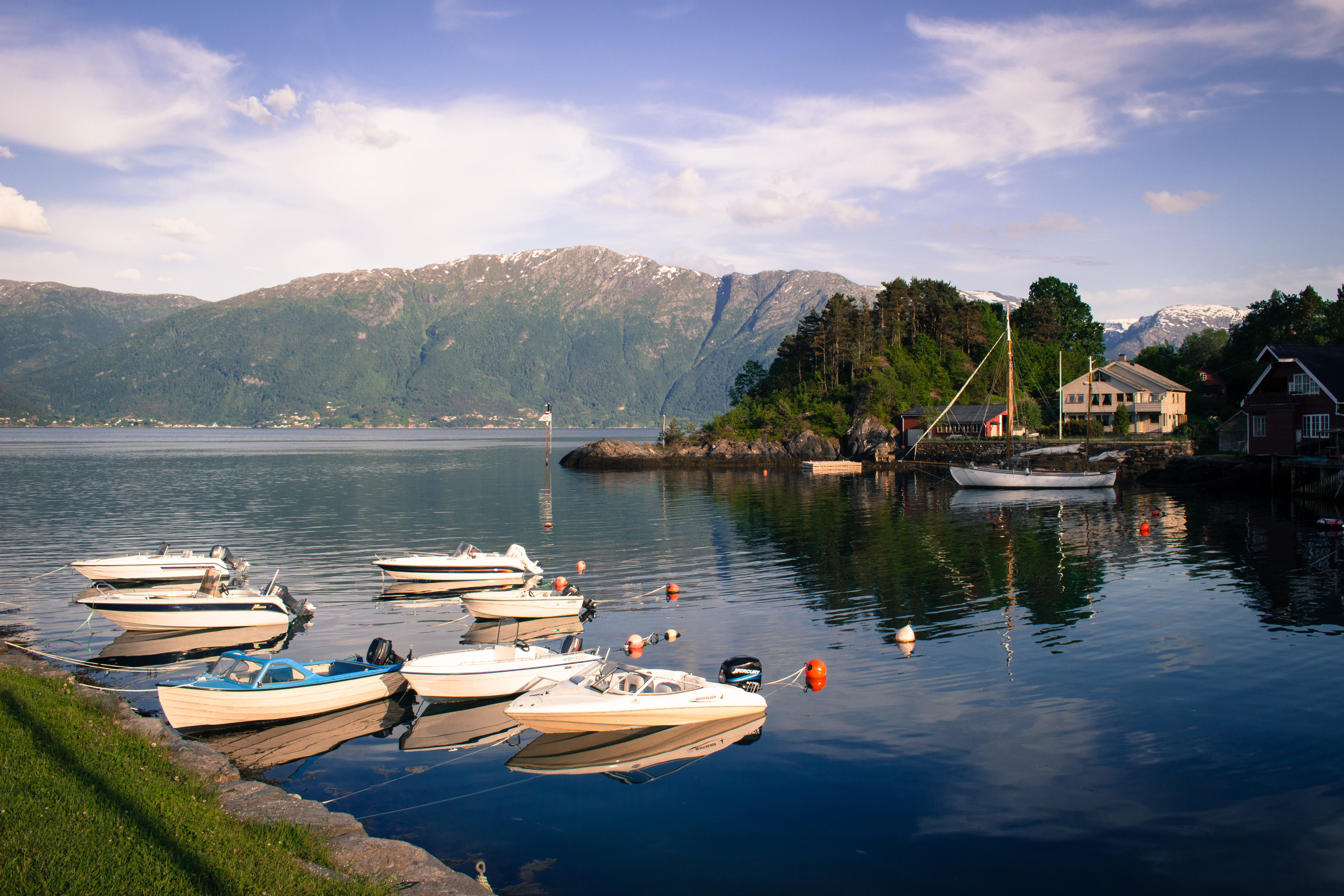 Tørvikbygd, Noruega.